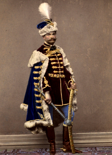 Széki gróf Teleki Sándor (Kolozsvár, 1821. január 27. – Nagybánya, 1892. május 18.) 1848-49-es honvédezredes, főrendiházi tag, a Petőfi Társaság tagja.